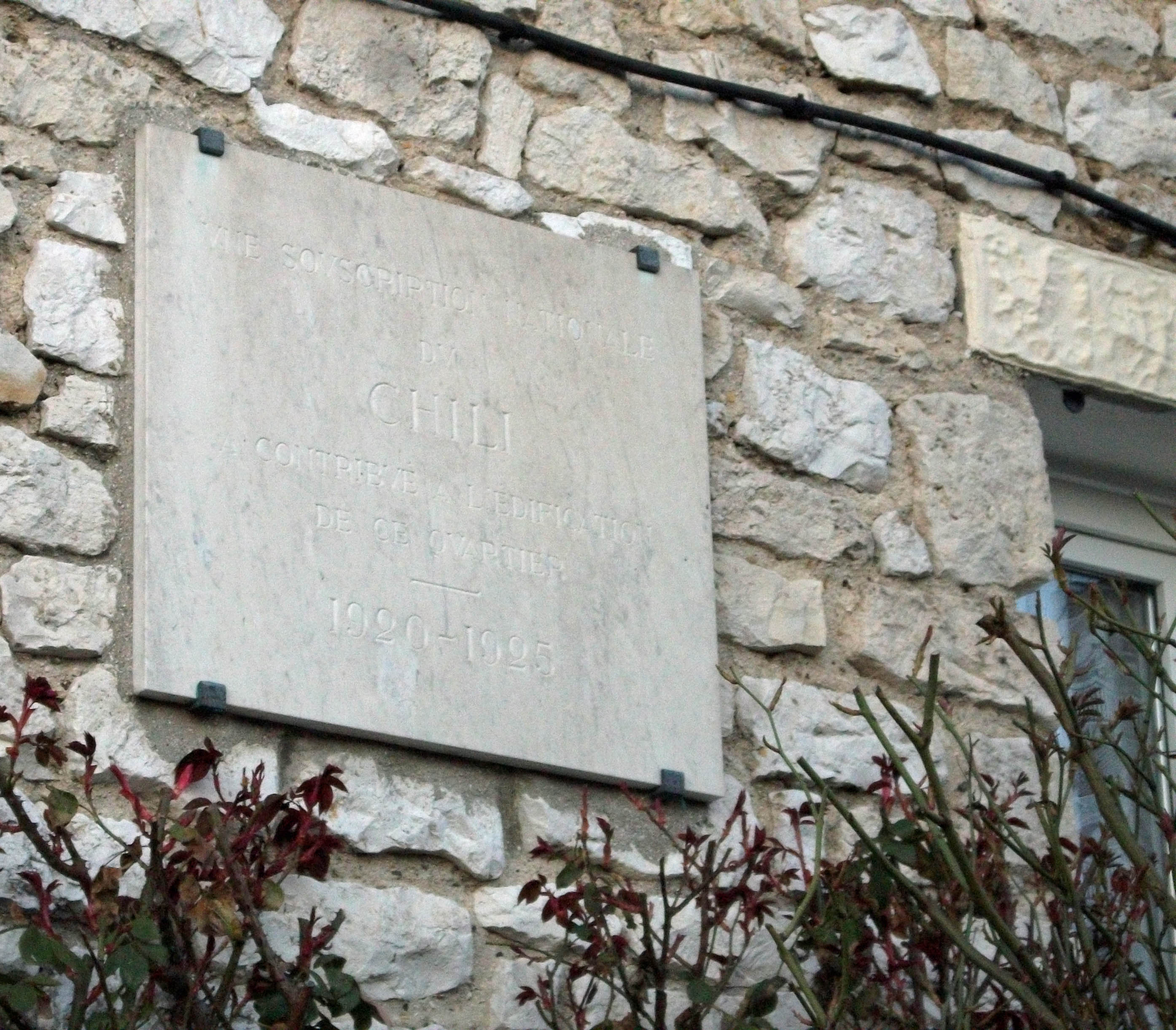 La_plaque_inaugurale du quartier Maison_Blanche à Reims. Le Texte : une souscription nationale du CHILI a contribué à l'édification de ce quartier 1920 1925'.